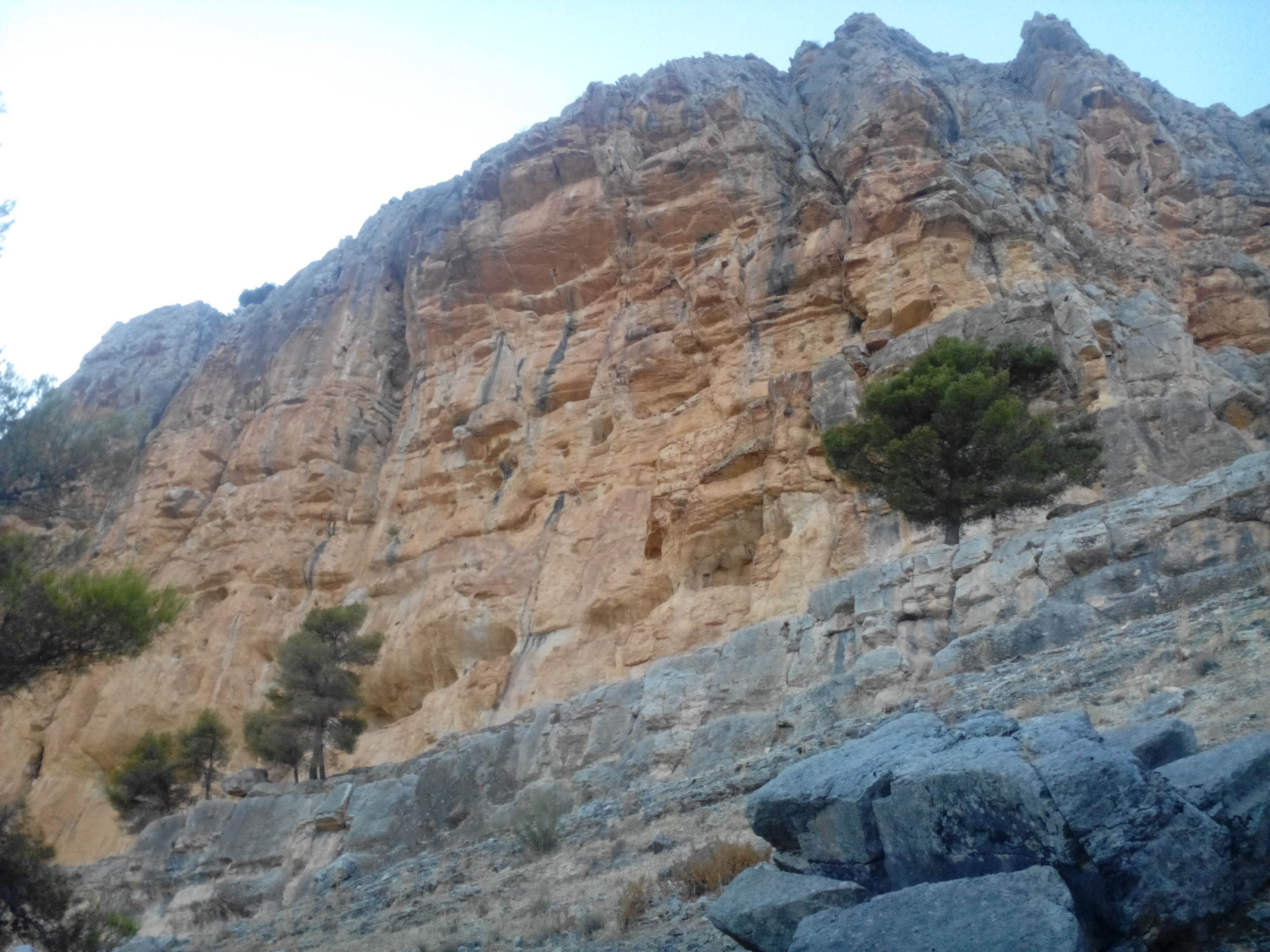 Abrigo en la Serrezuela de Pegalajar (Provincia de Jaén - España).